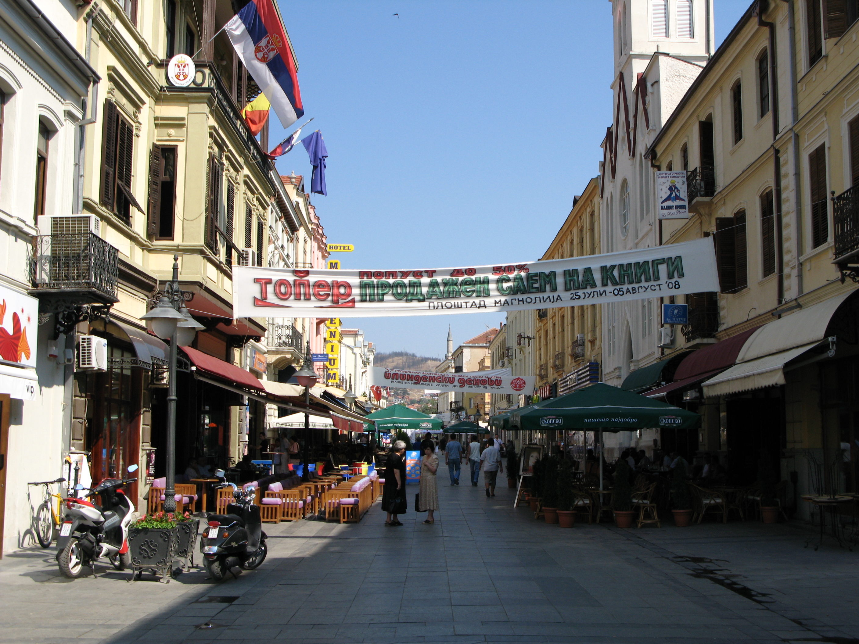 Корзо.Битољ.